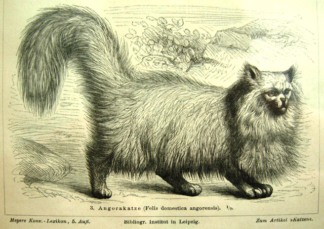 Descrizione: riporduzione di una stampa auteticata del 1890 circa, Stampa di proprietà A.Fontana Fonte: OTRS Ticket:2008041510029572 Data: Marzo 2008 Autore & Copyright: Alice Fontana)